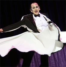 j